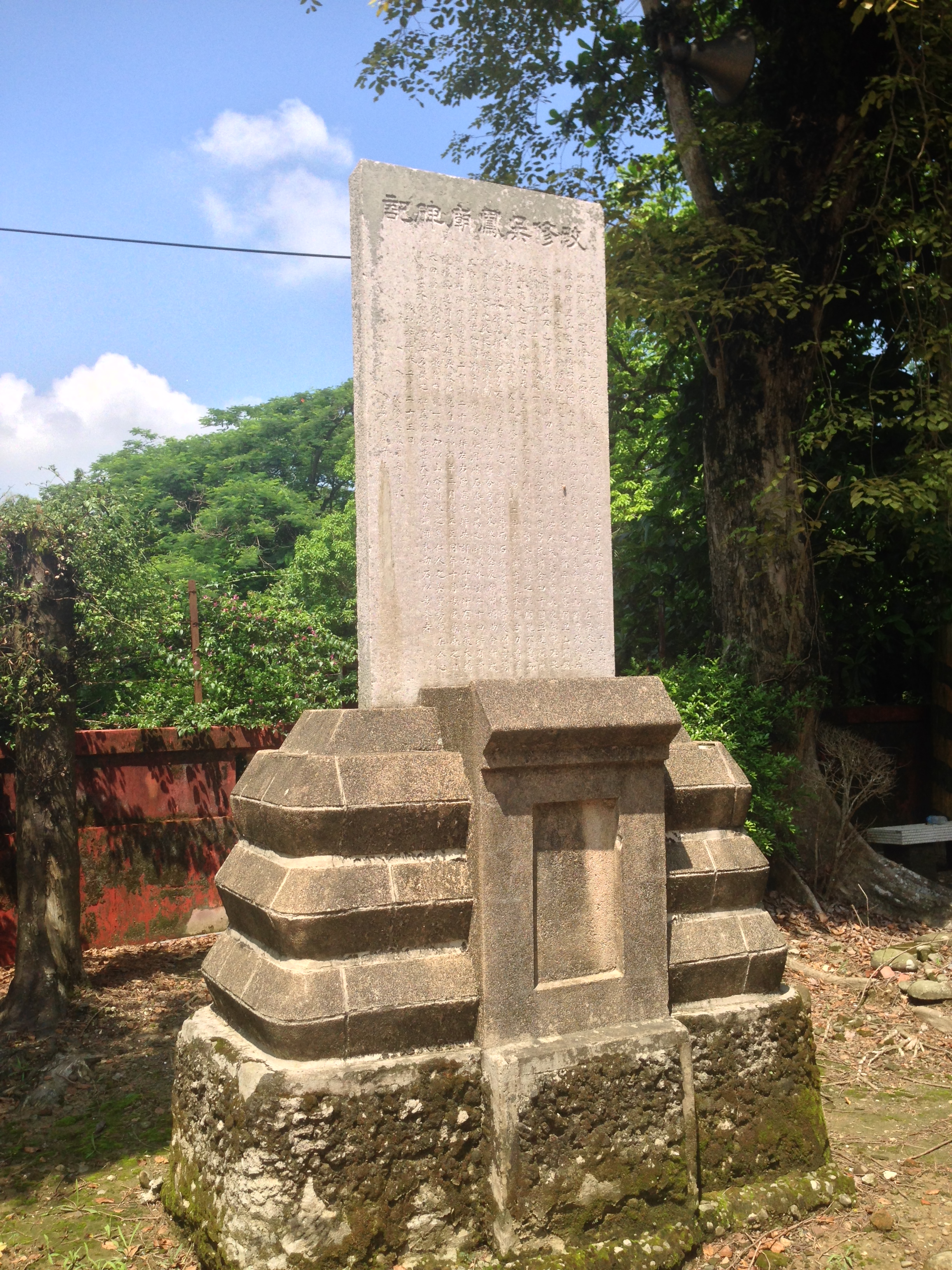 中文（台灣）: 改修吳鳳廟碑記